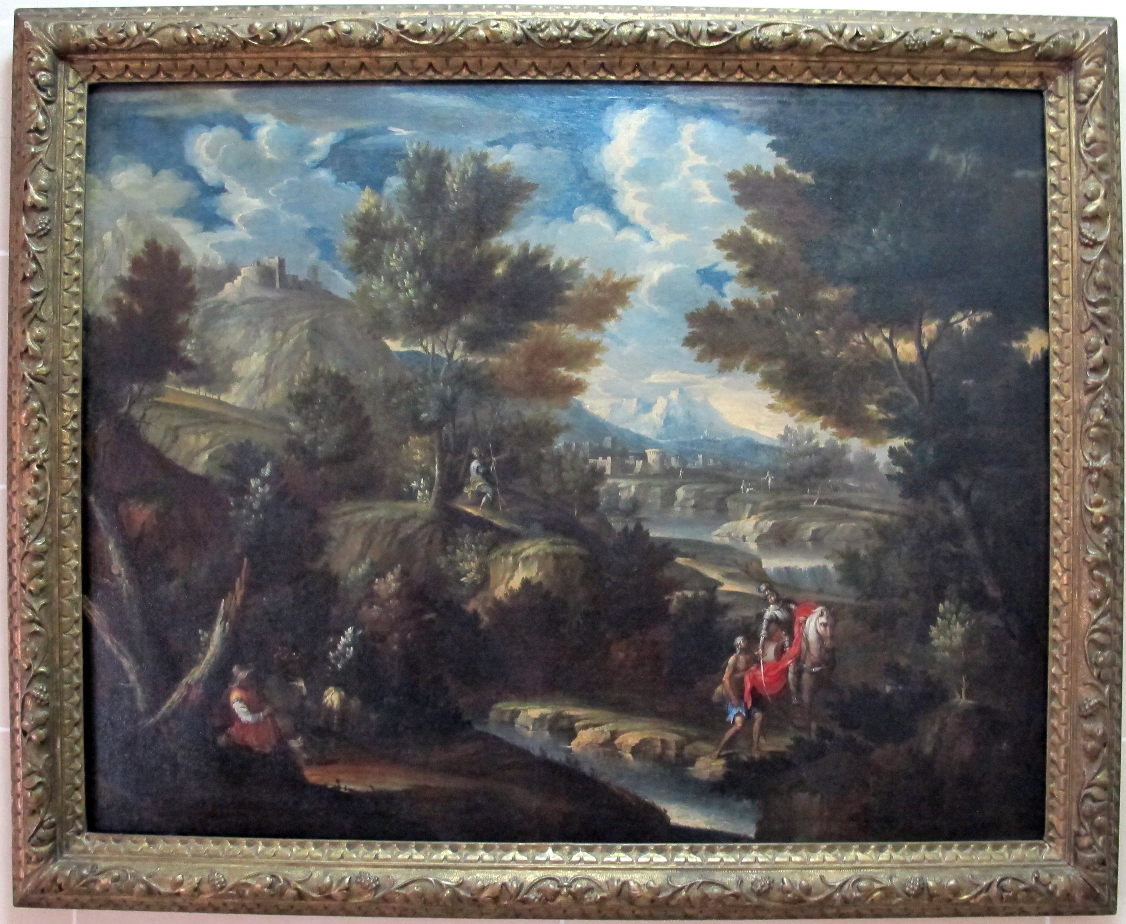 Pietro montanini, s. martino